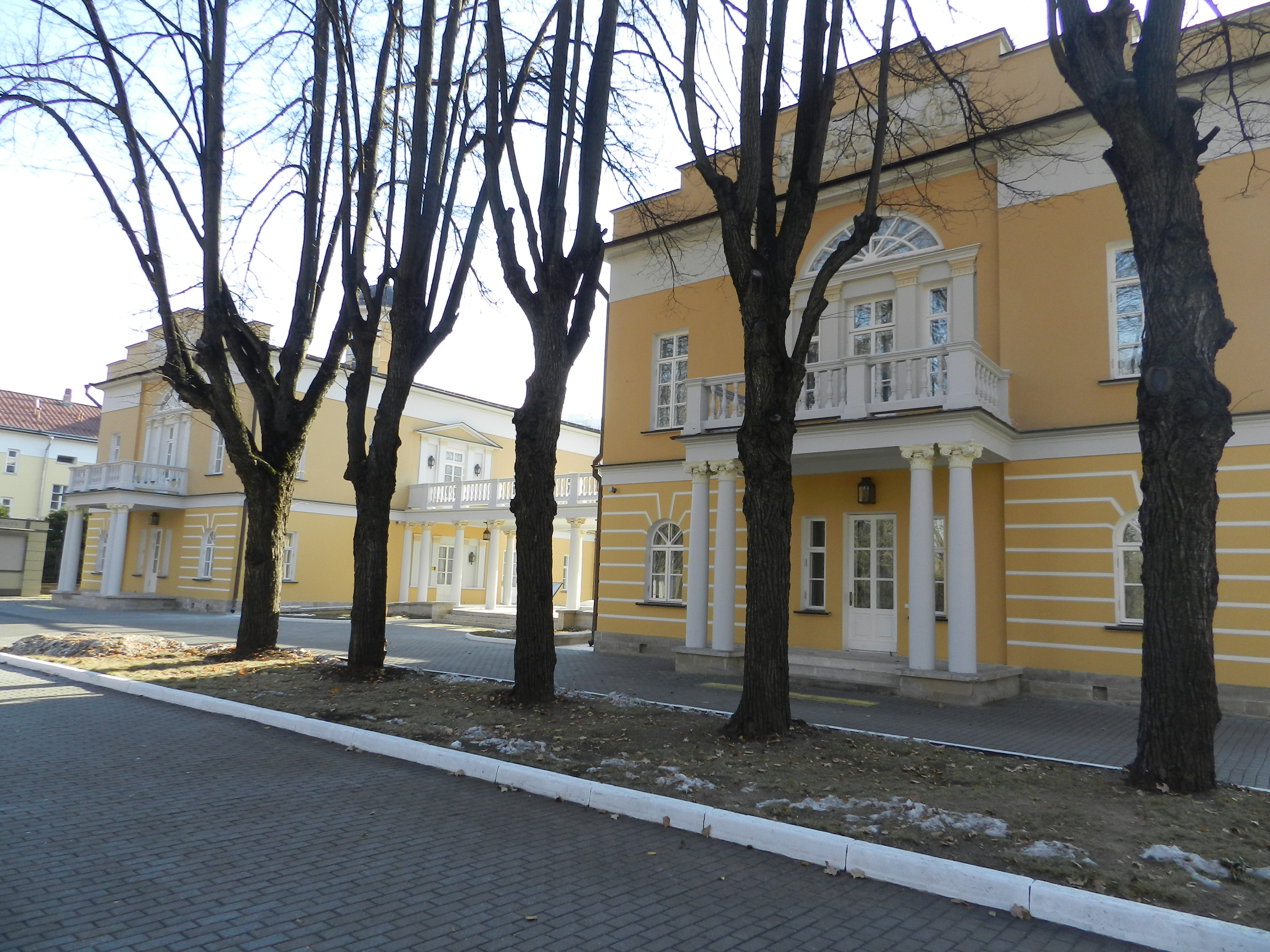 Школа театральная (Москва и Московская область, Дзержинский, Летняя улица, 2)